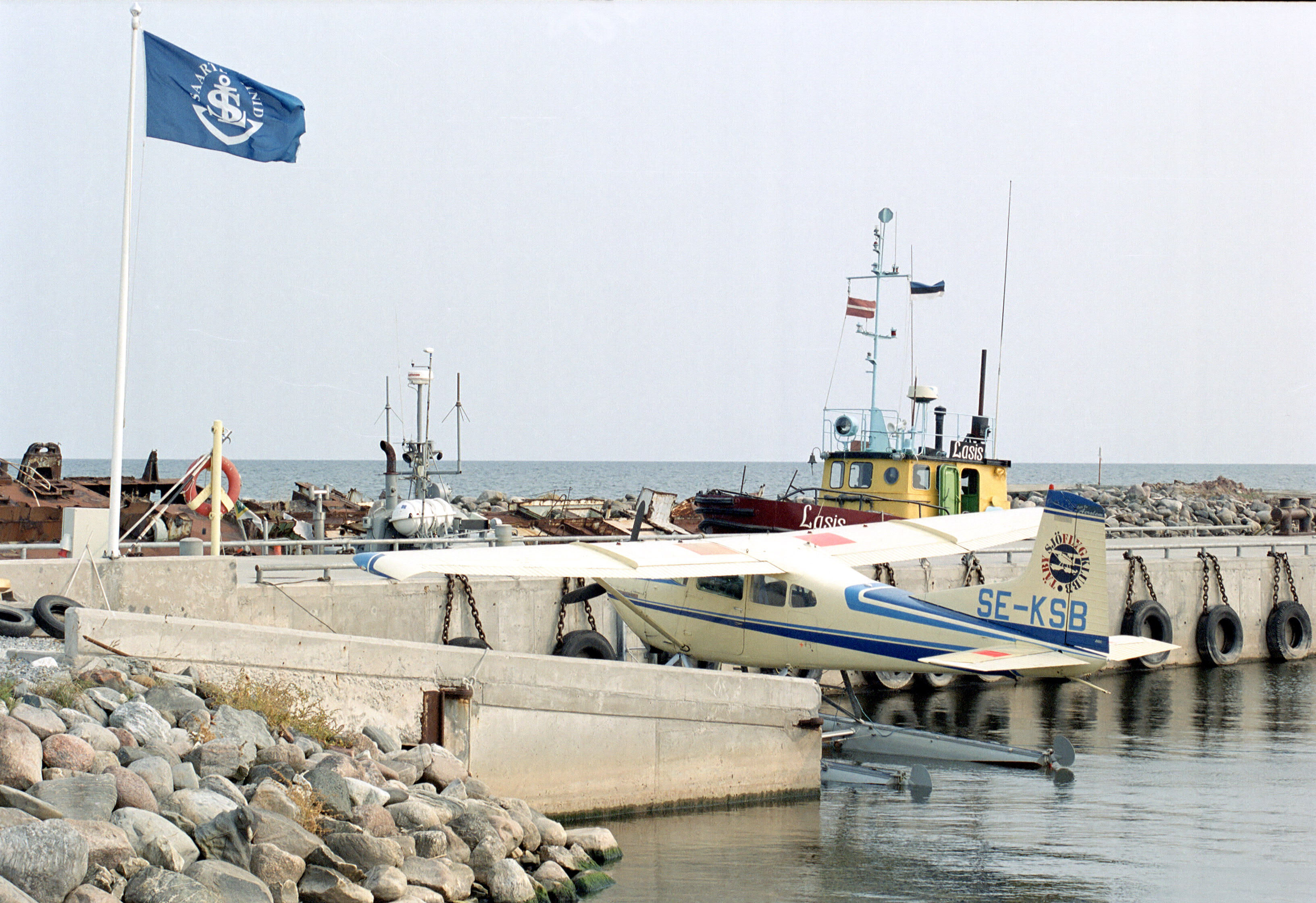 Ruhnu